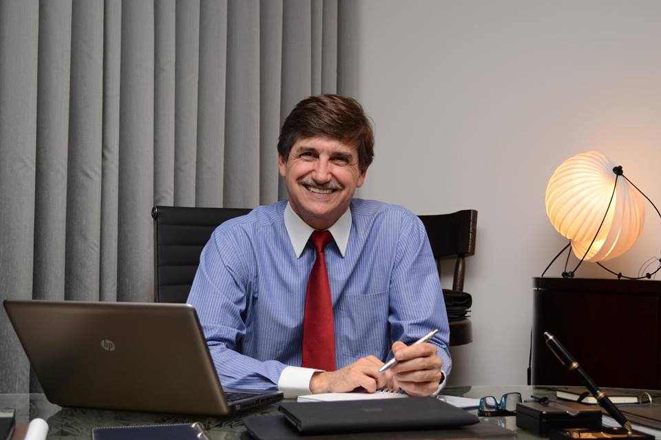 Senador Fausto Longo